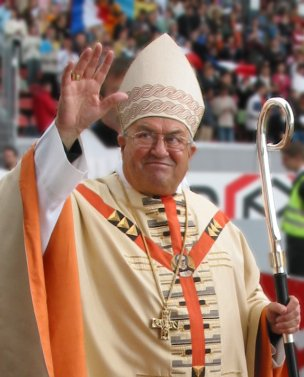 Karl Kardinal Lehmann 15. August 2005, Abschlussgottesdienst "Tage der Begegnung", Mainz (Bruchwegstadion)